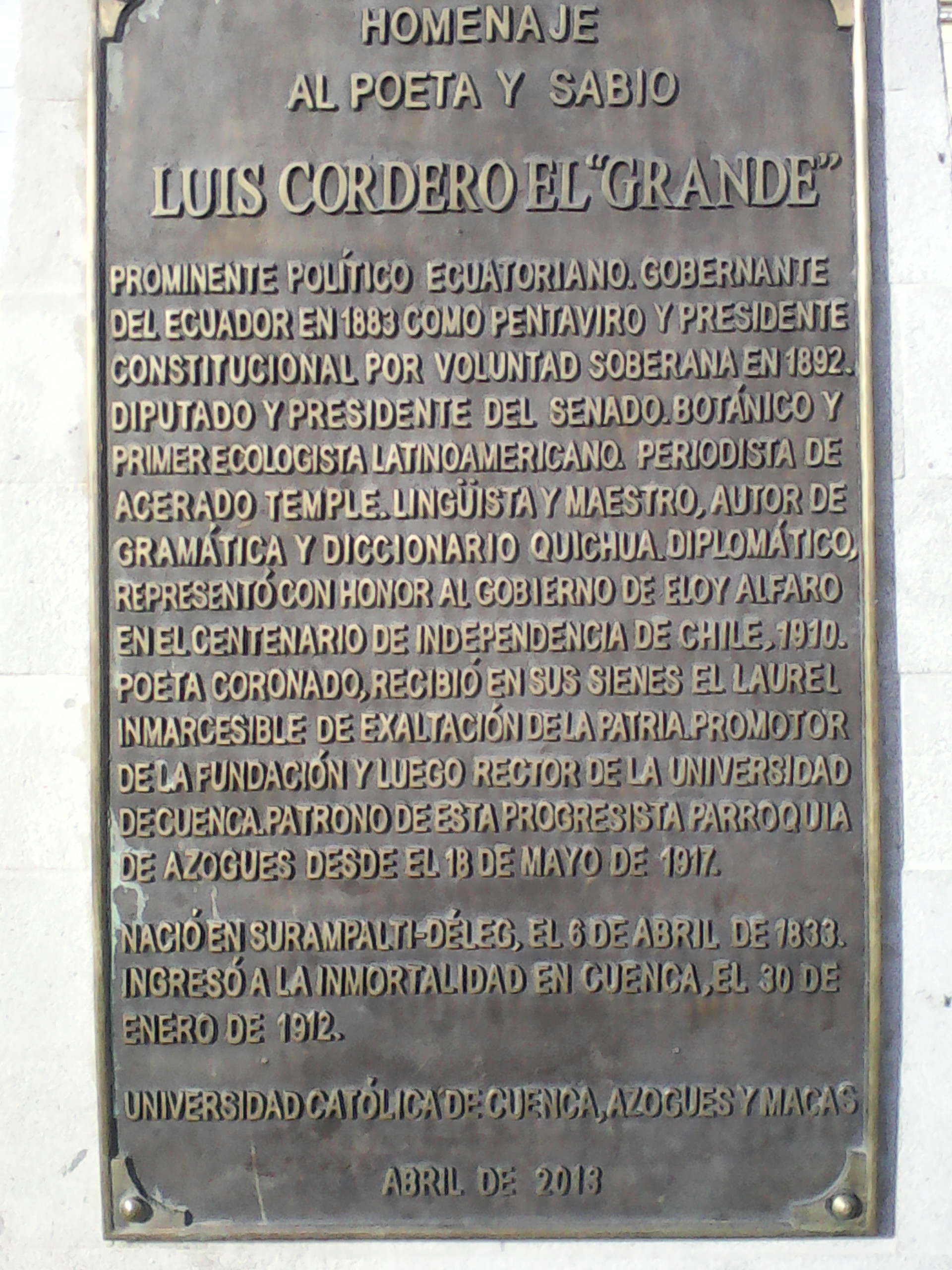 Busto de Luis Cordero, en la parroquia del mismo nombre, Azogues, Ecuador